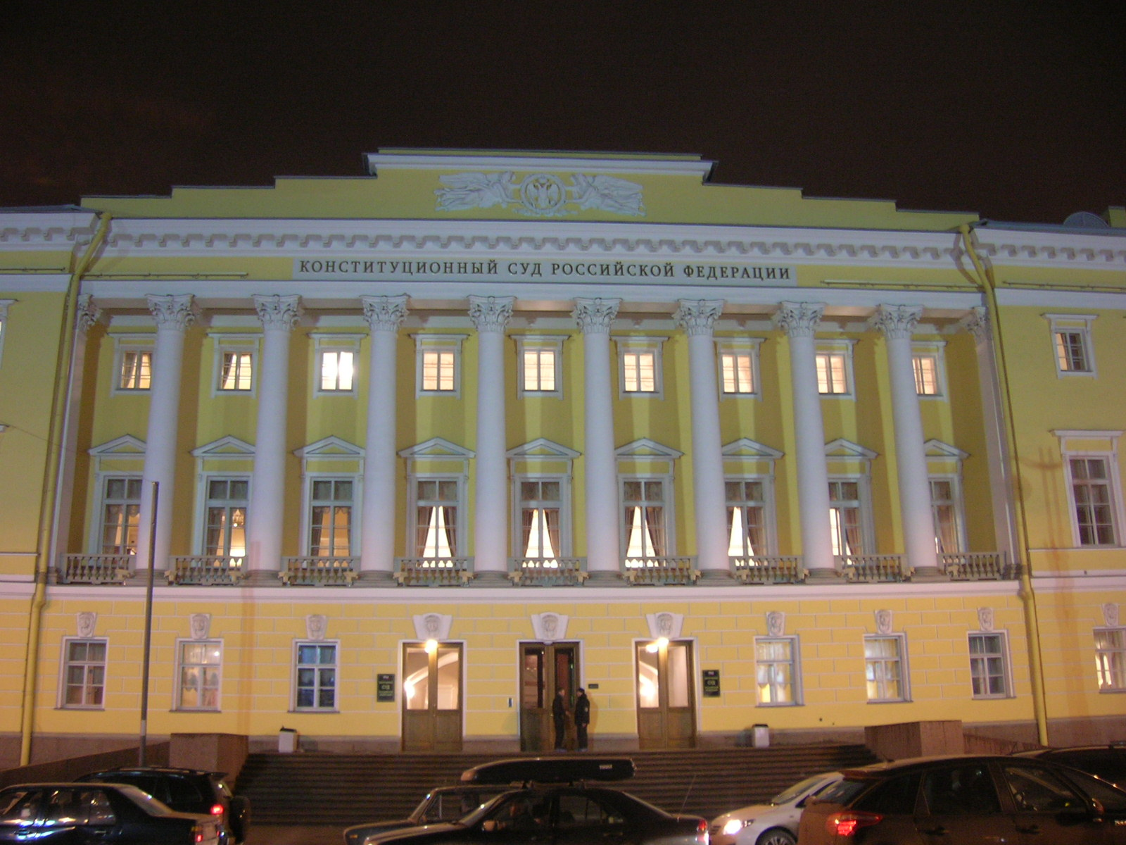 здание конституционного суда, построено в 1834 году